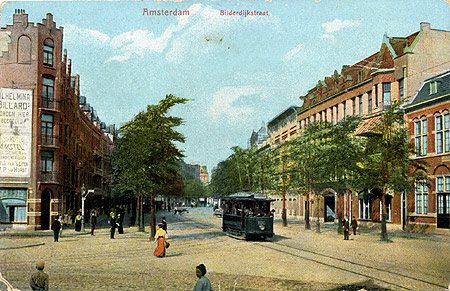 Oude ansichtkaart van de Bilderdijkstraat in Amsterdam Oud-West met tramlijn 3